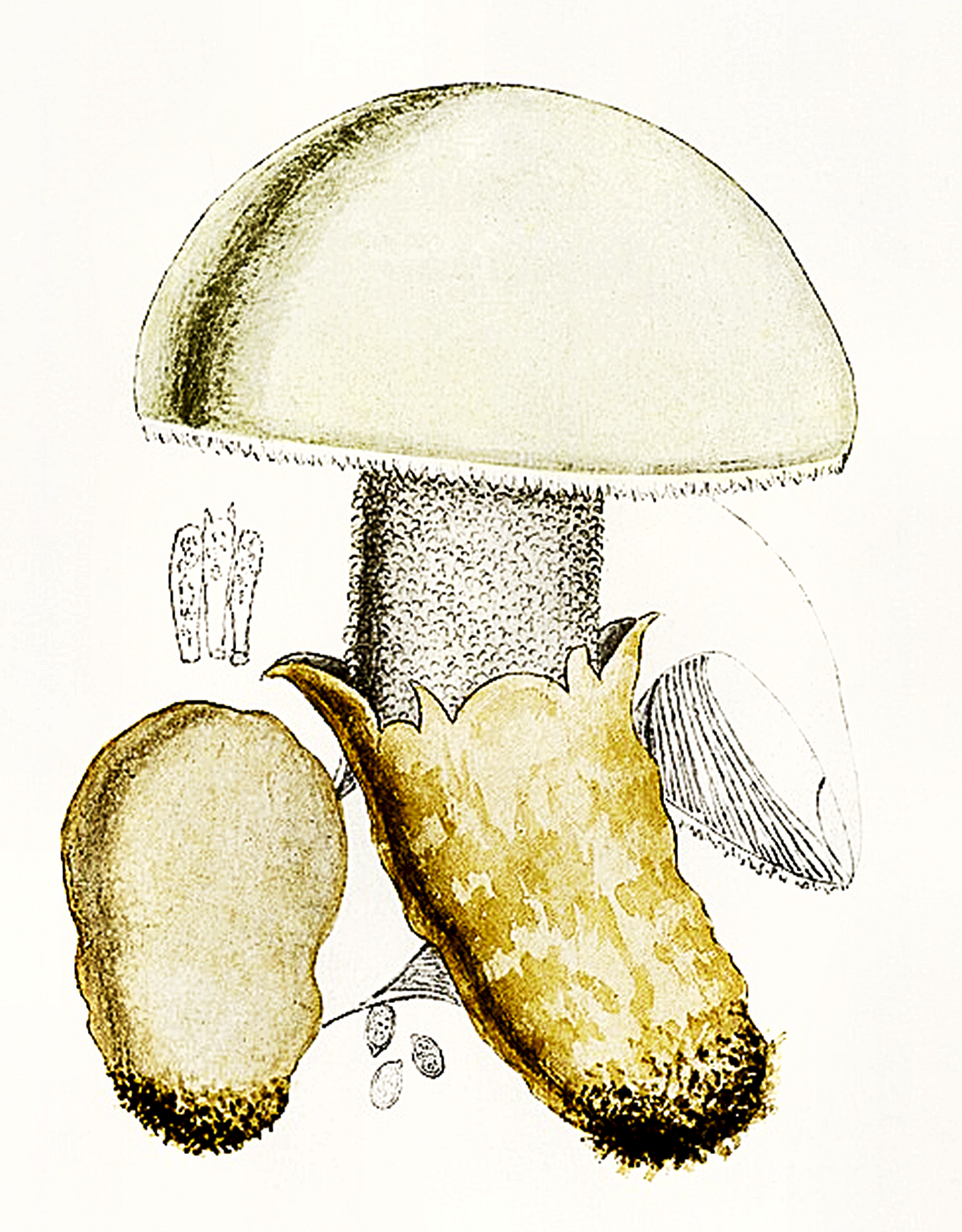 Giacomo Bresadola: Amanita ovoidea Pierre Bulliard